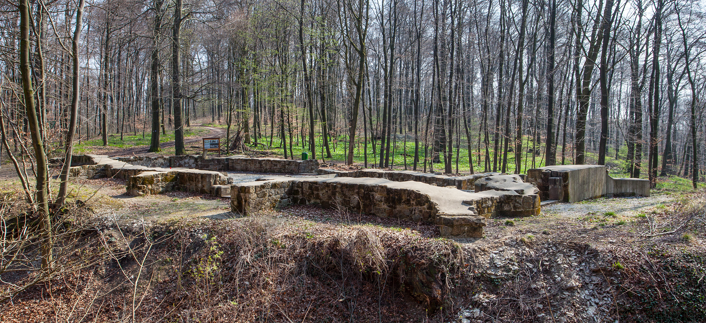 Die Reste des Jostbergklosters im Teutoburger Wald südwestlich von Bielefeld. Ansicht von Westen.